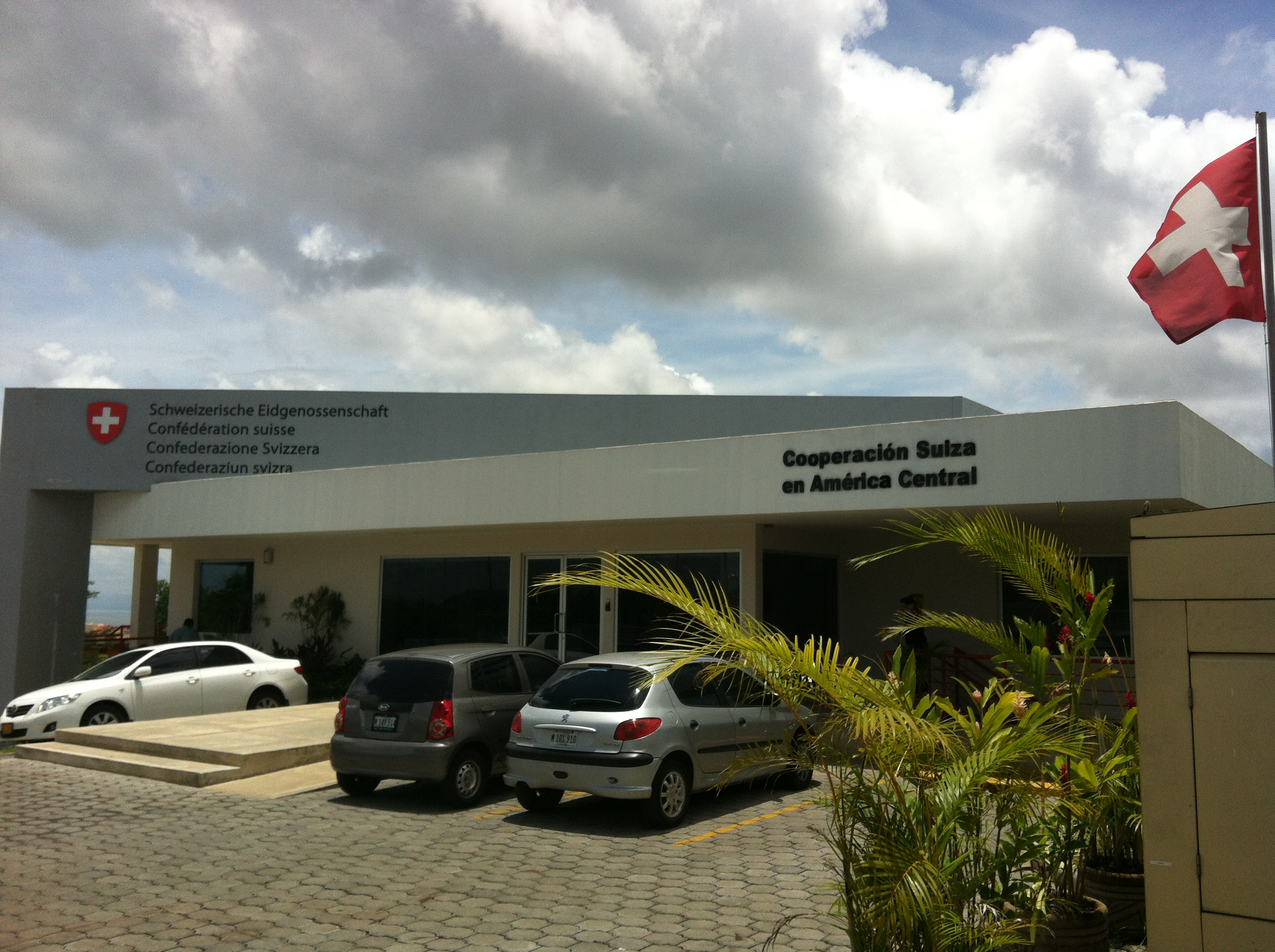 Schweizer Botschaft, wurde 2010 eröffnet und hat ein excellente Aussicht über die ganze Stadt.